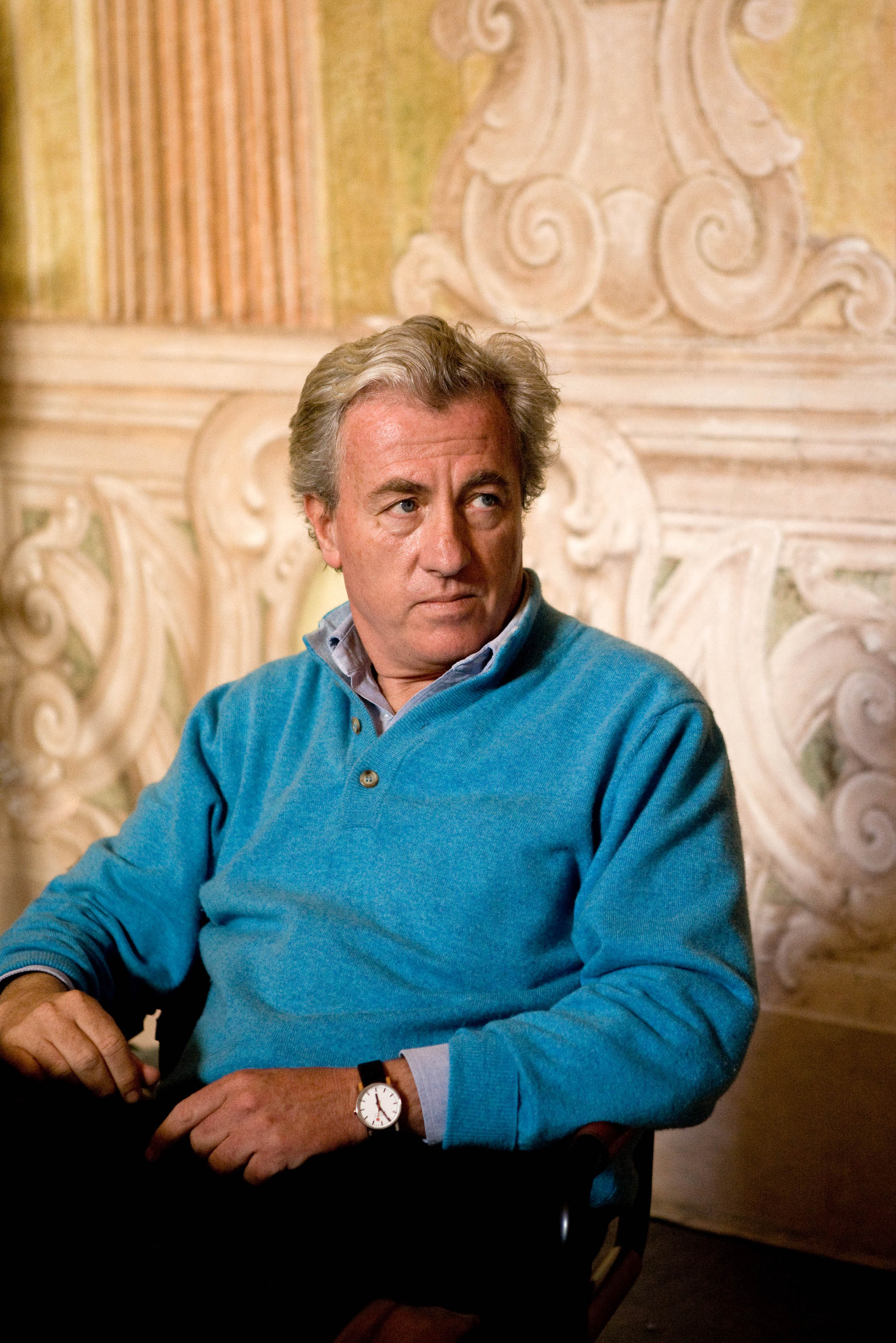 Luca De Fusco